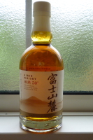 富士山麓 50%（樽熟50°） 麒麟麦酒が販売しているウイスキーの銘柄。